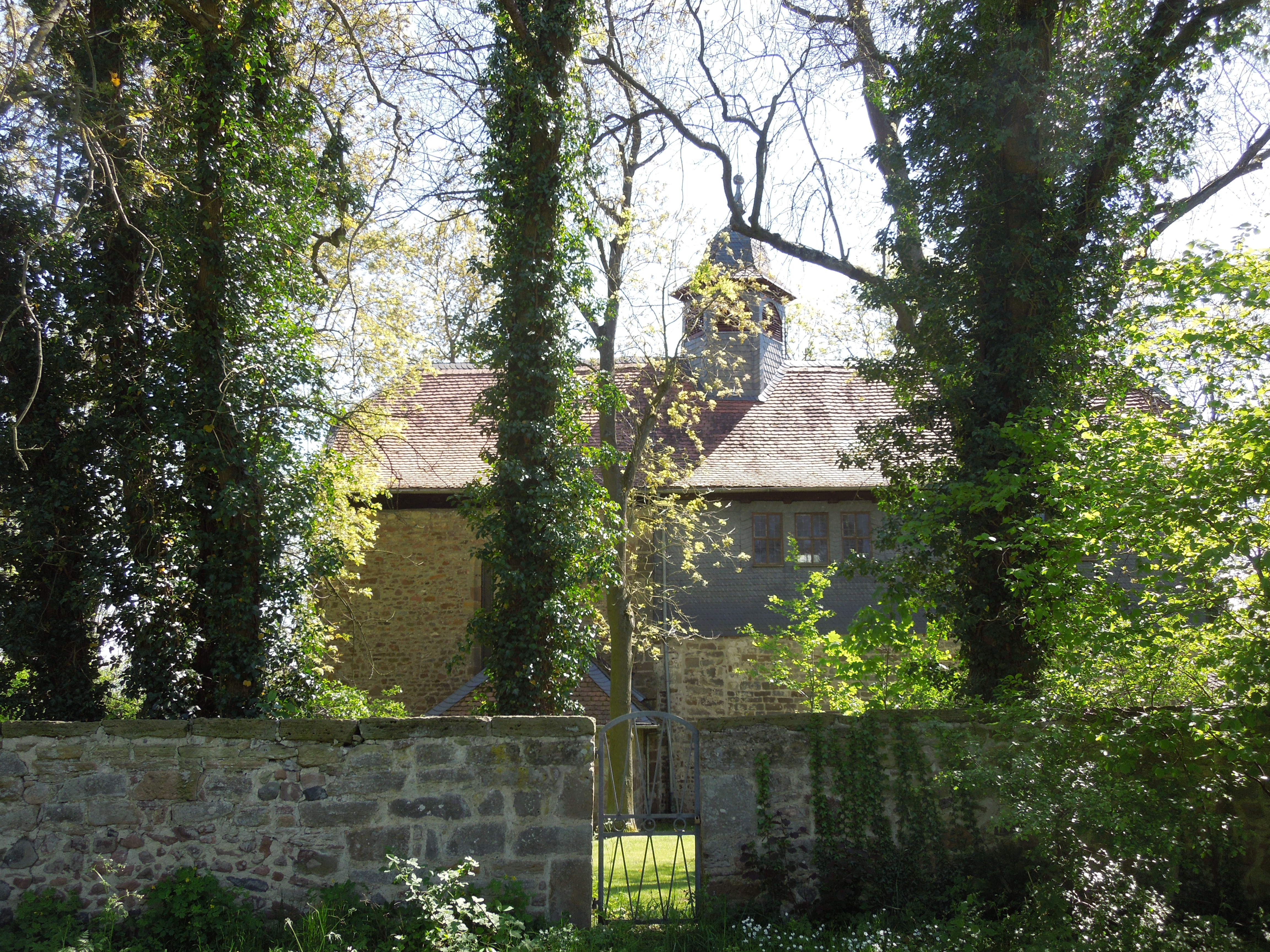 Die Fraumünsterkirche am Ostrand von Fritzlar